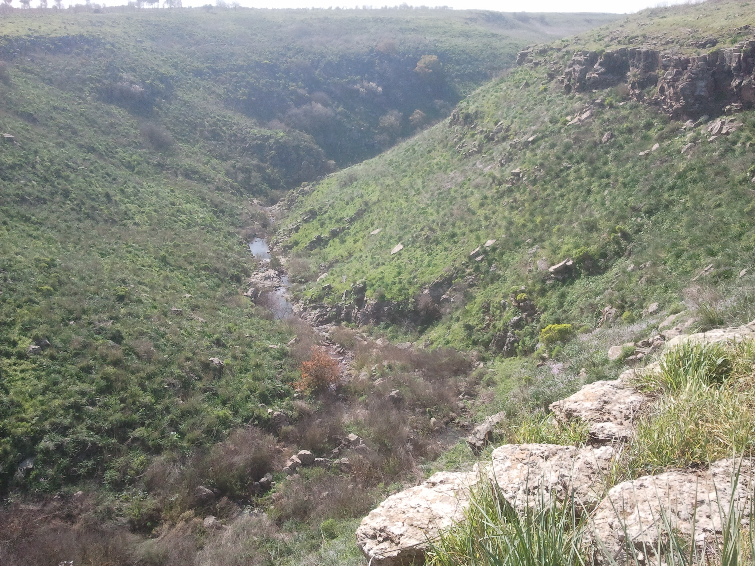 נחל דליות בתחומי שמורת גמלא